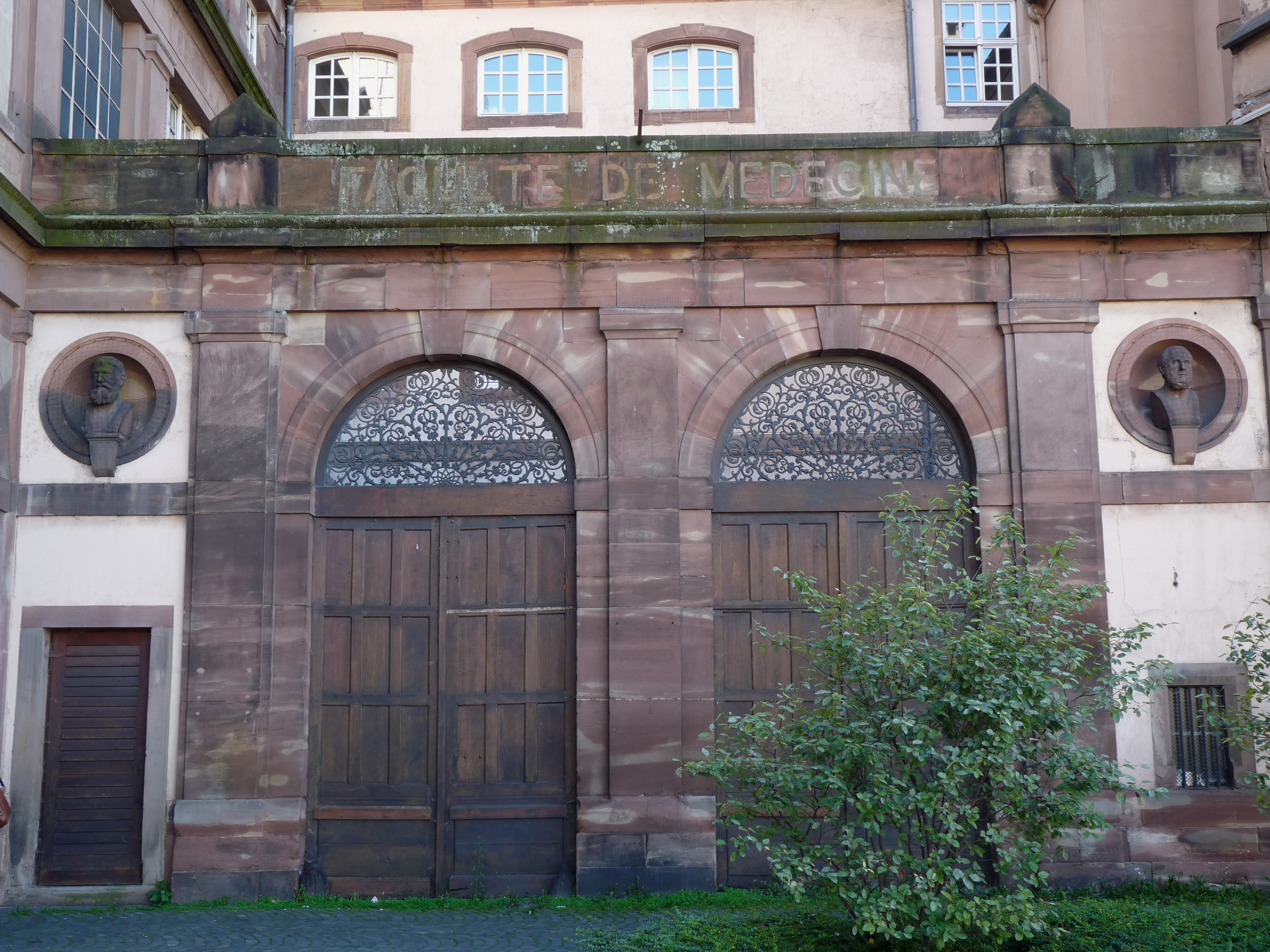 Ancienne Faculté de Médecine de Strasbourg, côté place de l'Hôpital.